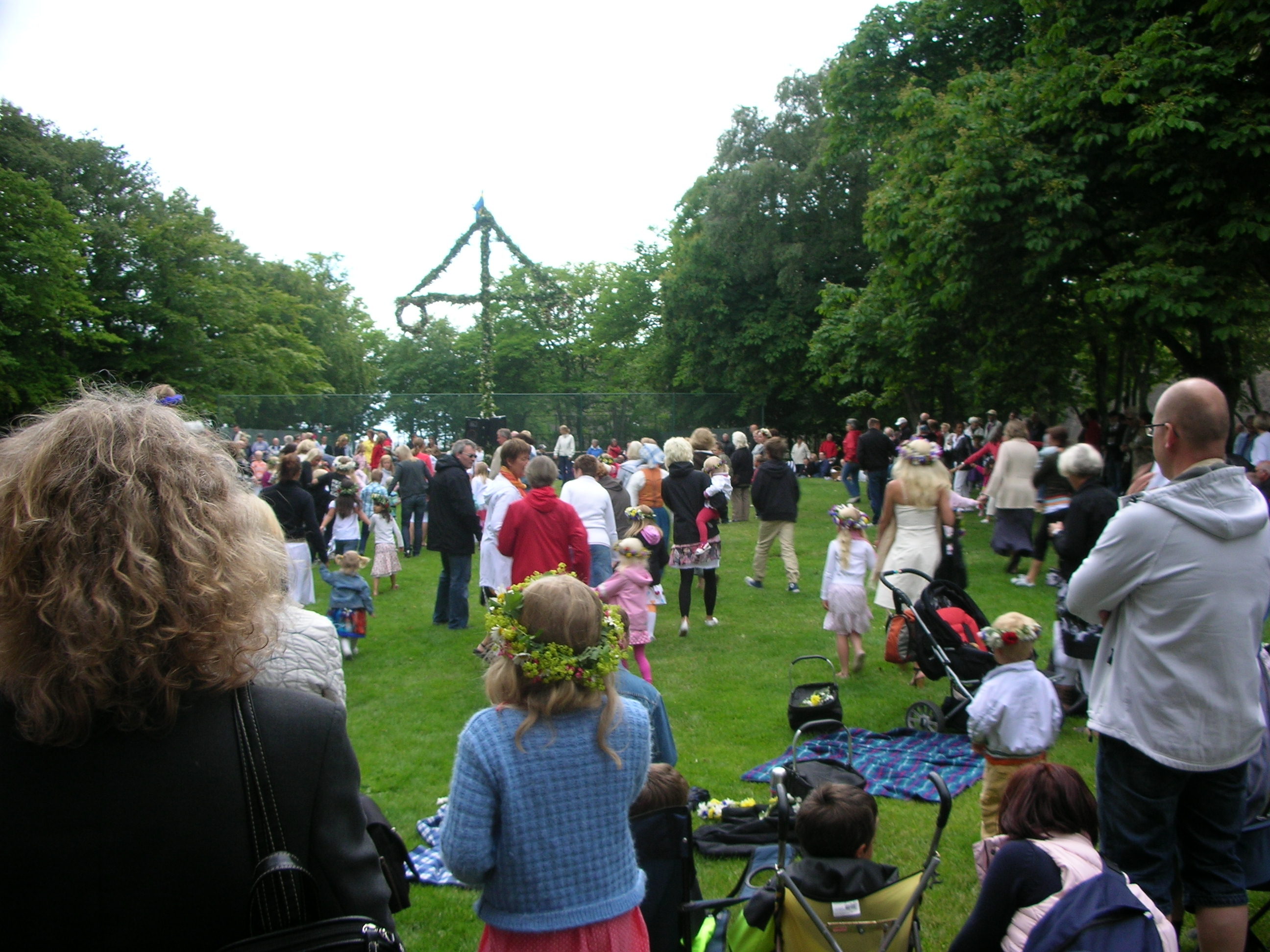 Midsommarfirande i Varberg 19 juni 2009.